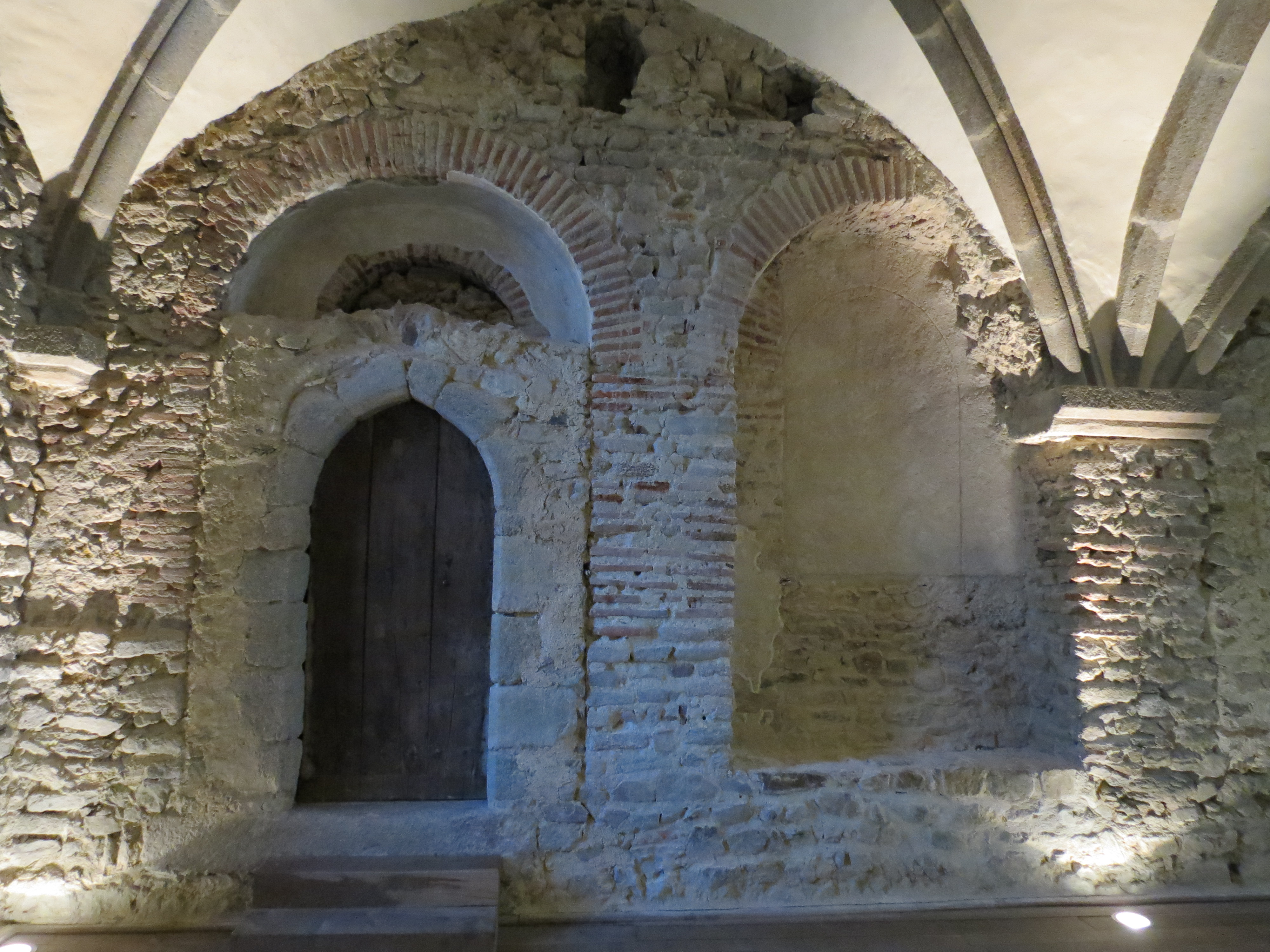 Palais carolingien du château de Mayenne, Pays de la Loire.